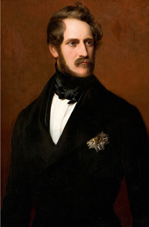 Herzogs Friedrich Wilhelm Alexander von Württemberg Fils d’Aléxandre-Frédéric-Charles, Duc de Wurtemberg e d’Antoinette-Ernestine-Amélie, de Saxe-Saalfeld-Cobourg. Né le 20 Décembre 1804, Marié le 17 Octobre 1837, à Marie-Christine-Caroline-Adelaide-Françoise-Leopoldine, Princesse d’Orléans.